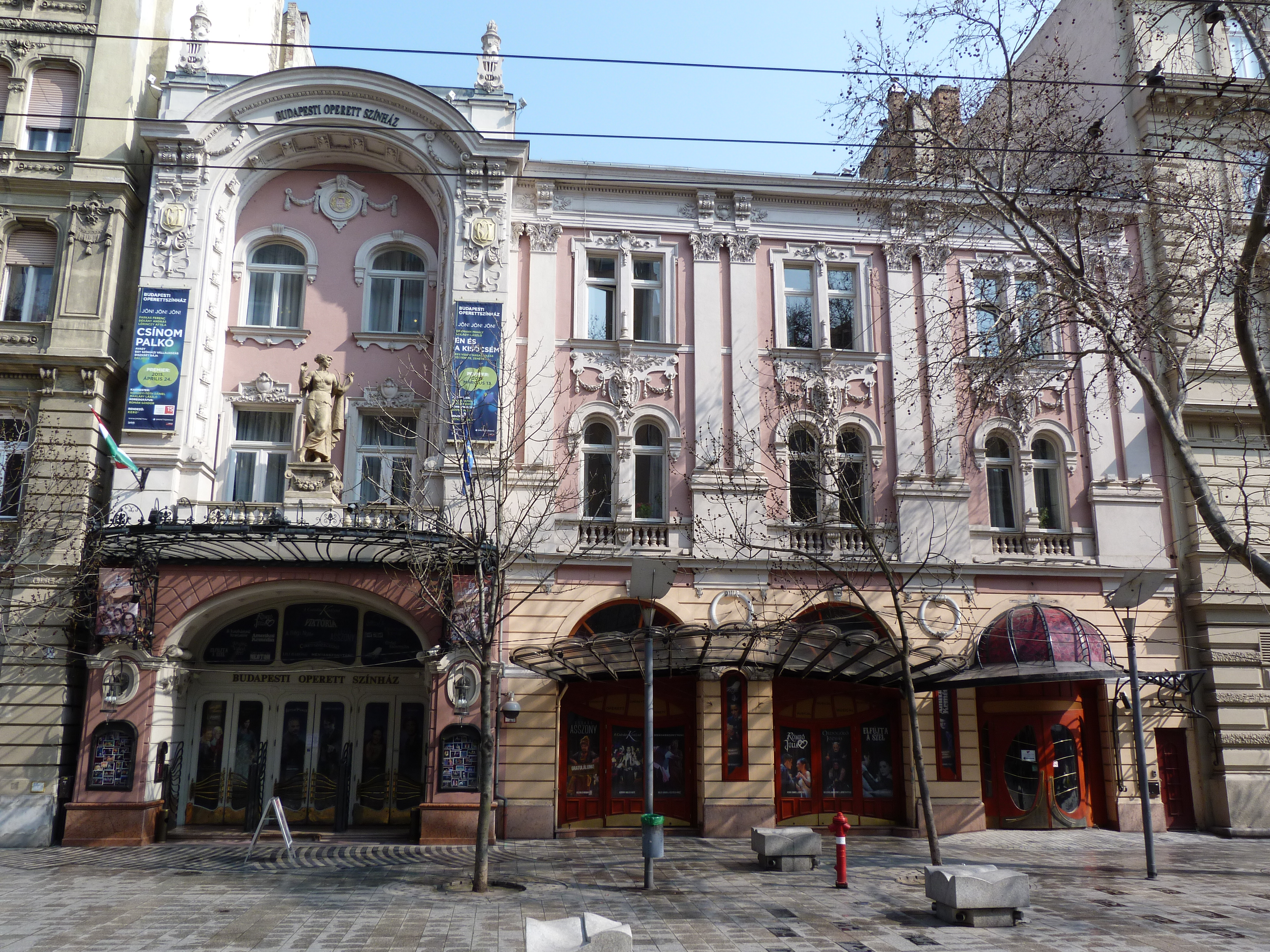 A felvétel 2015. március 23-án készült Budapesten, a Nagymező utcában. Operett Színház. ©© Derzsi Elekes Andor, Budapest, 2015, A fénykép másolását és felhasználását a szerző ellenérték nélkül megengedi. Az engedély kiterjed a kereskedelmi célú hasznosításra is. Kéri azonban nevének feltüntetését a felhasználás során. A Metapolisz sorozat valamennyi képe és filmje Creative Commons alatti. kereskedelmi - for profit - célra is felhasználható. Ajánlott hivatkozás: Derzsi Elekes Andor: Metapolisz DVD line